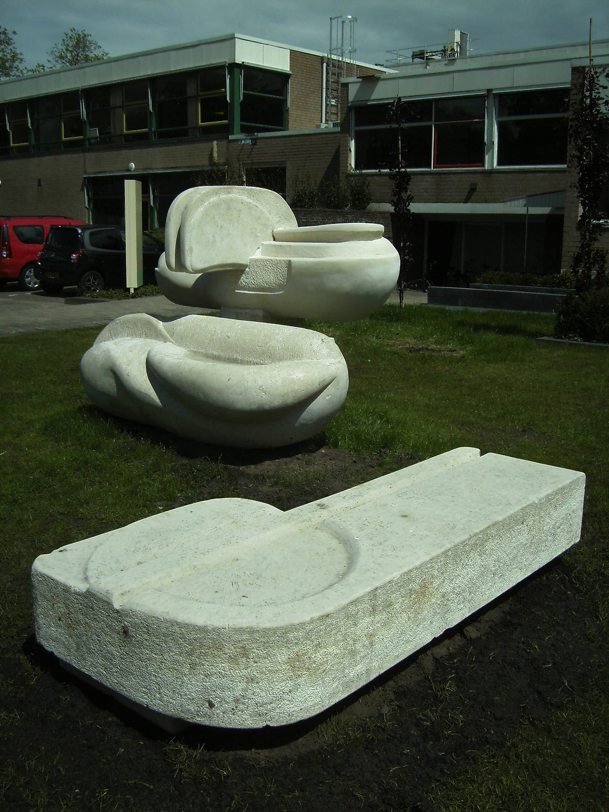 Fontein met twee zitbanken. Werd begin jaren tachtig geplaatst in het kantoor van de Rabo-bank aan de Brink. Later opgesteld in een schoolgebouw. Bij een verbouwing verwijderd en opgeslagen. In 2009 buiten geplaatst bij het administratiegebouw van het Etty Hillesum Lyceum aan de Laan Van Borgele. In 2010 stuk gevroren en in 2012 gerestaureerd en opnieuw geplaatst met achterwege laten van het watergedeelte.